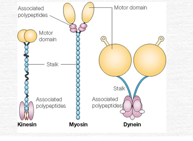 typischerweise bestehend aus Schwanz- und Motordomäne